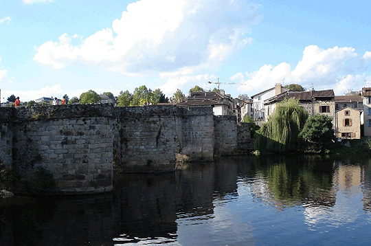 Le Pont Saint-Martial à Limoges, sur le chemin de Saint-Jacques de Compostelle.